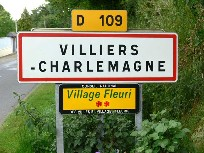 Villiers-Charlemagne Panneau